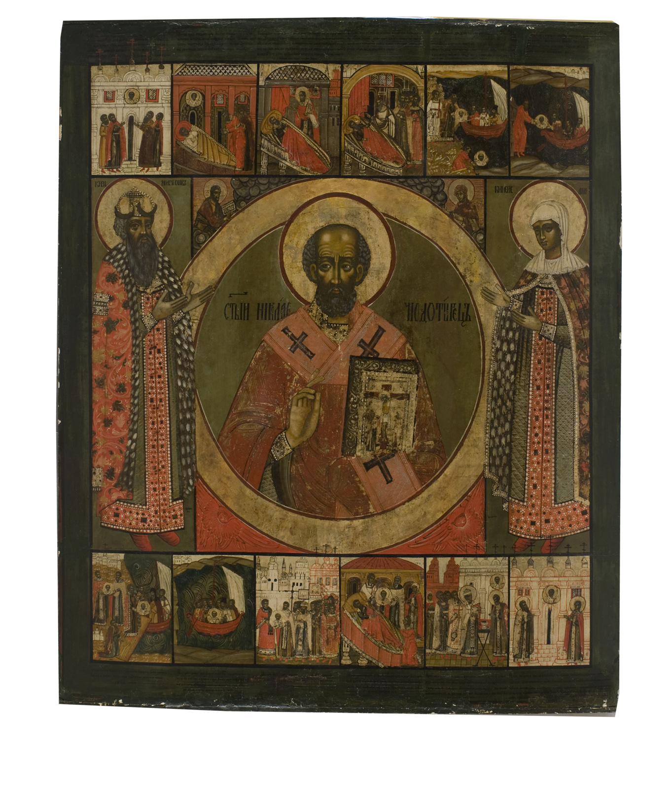 Икона «Святитель Николай Чудотворец (Дворищенский), с предстоящими благоверными князем Мстиславом и княгиней Анной Новгородскими и 12 клеймами обретения образа Святителя Николая». Первая треть XVIII века, Новгород. Дерево, левкас, темпера. Из собрания музея "Дом Иконы и Живописи имени С.П. Рябушинского".